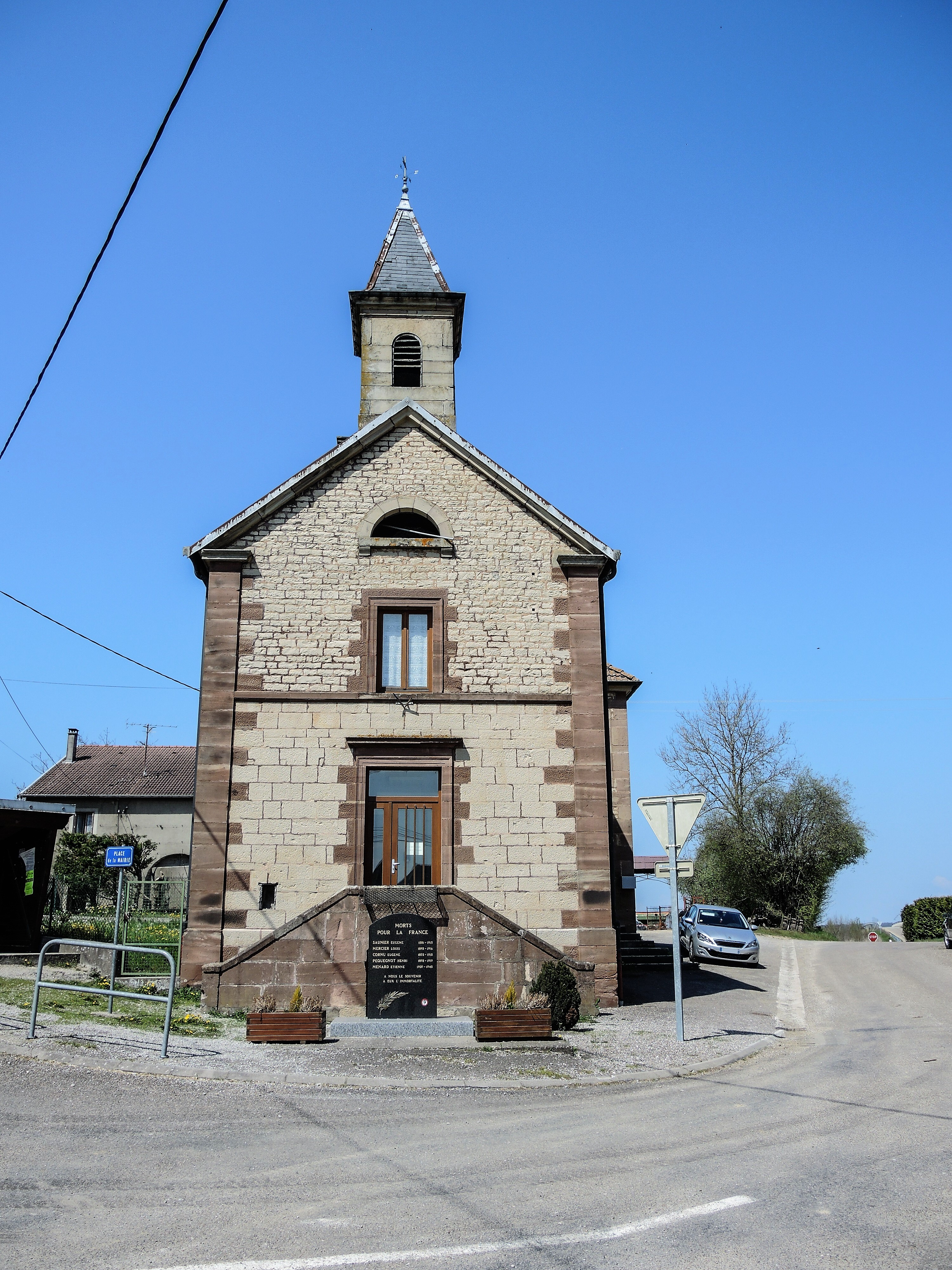 Façade de la mairie